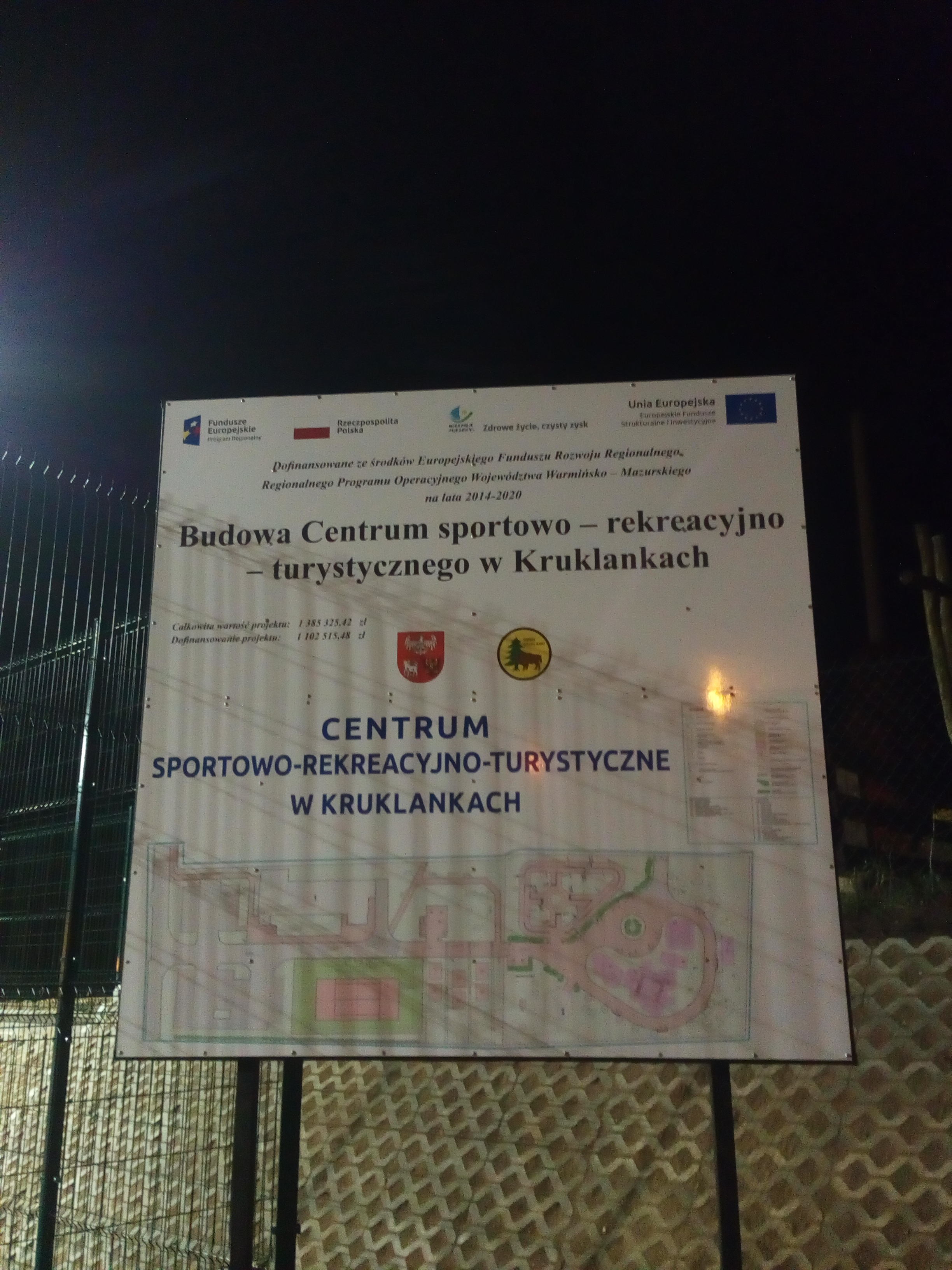 Information board about the Sportowo-Rekreacyjno-Turystyczne Center in Kruklanki